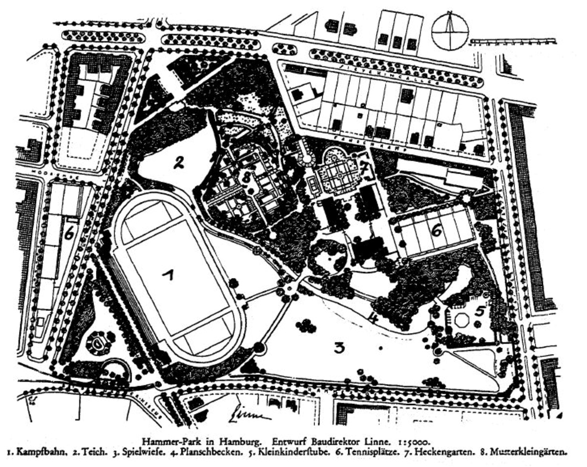 Revidierter Plan von Gartenbaudirektor Otto Linne für die Umgestaltung des Hammer Parks in Hamburg, abgedruckt in: Die Gartenkunst Heft 1/1929, S. 8.